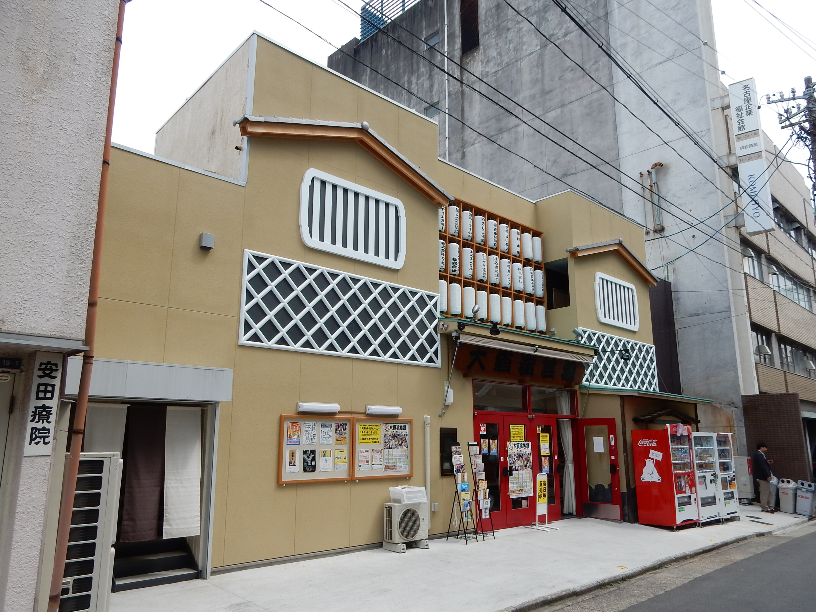 大須演芸場。愛知県名古屋市中区大須2-19-39